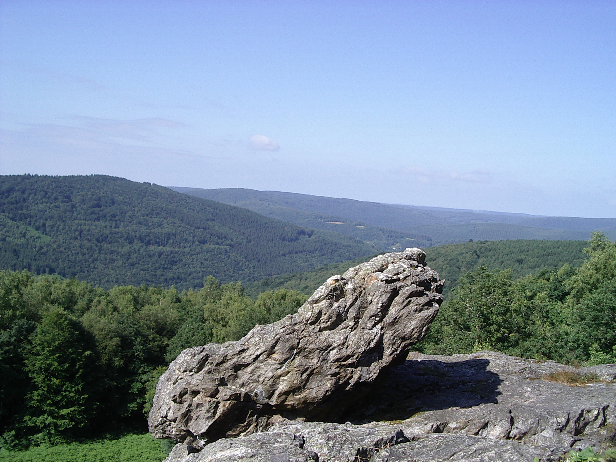 Site Dit Roc la Tour, Monthermé, Ardennes, France.